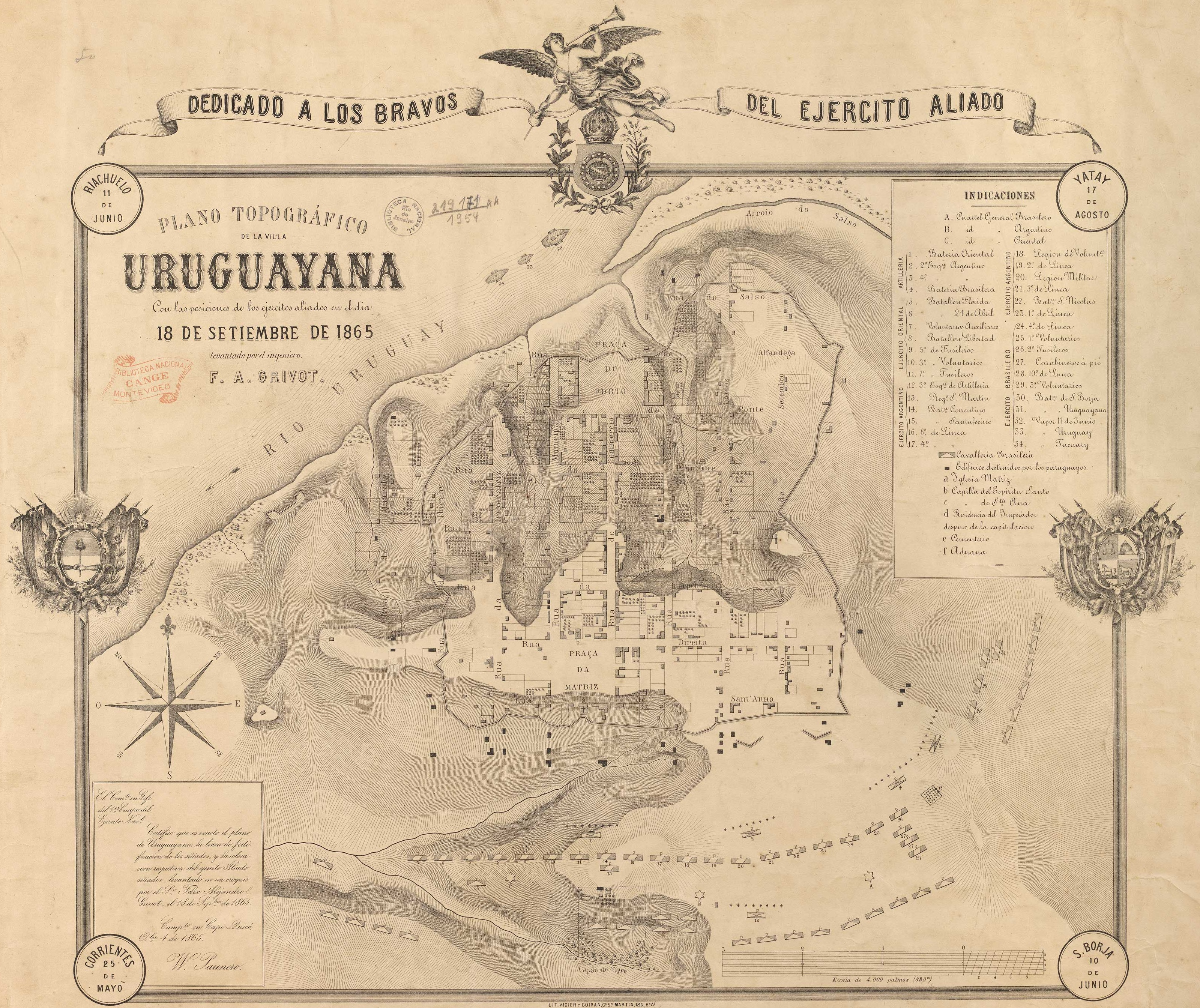 Plano topográfico de la villa Uruguayana con las posiciones de los ejercitos aliados en el dia 18 de Setiembre de 1865 [Cartográfico] / levantado por el ingeniero F. A. Grivot.